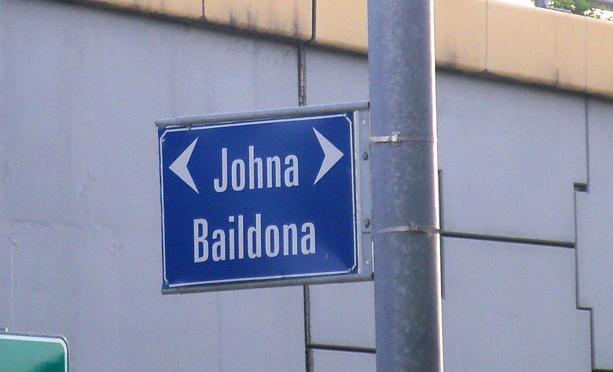 Ulica Johna Baildona w Katowicach - znaczek